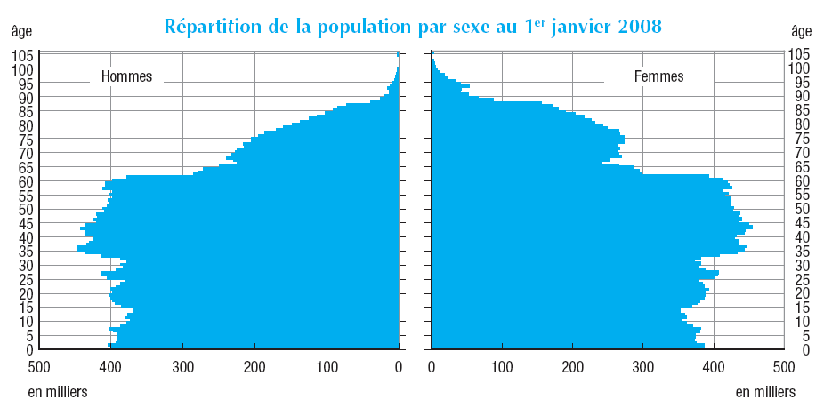 Piramida de las edades en Francia en 2008.